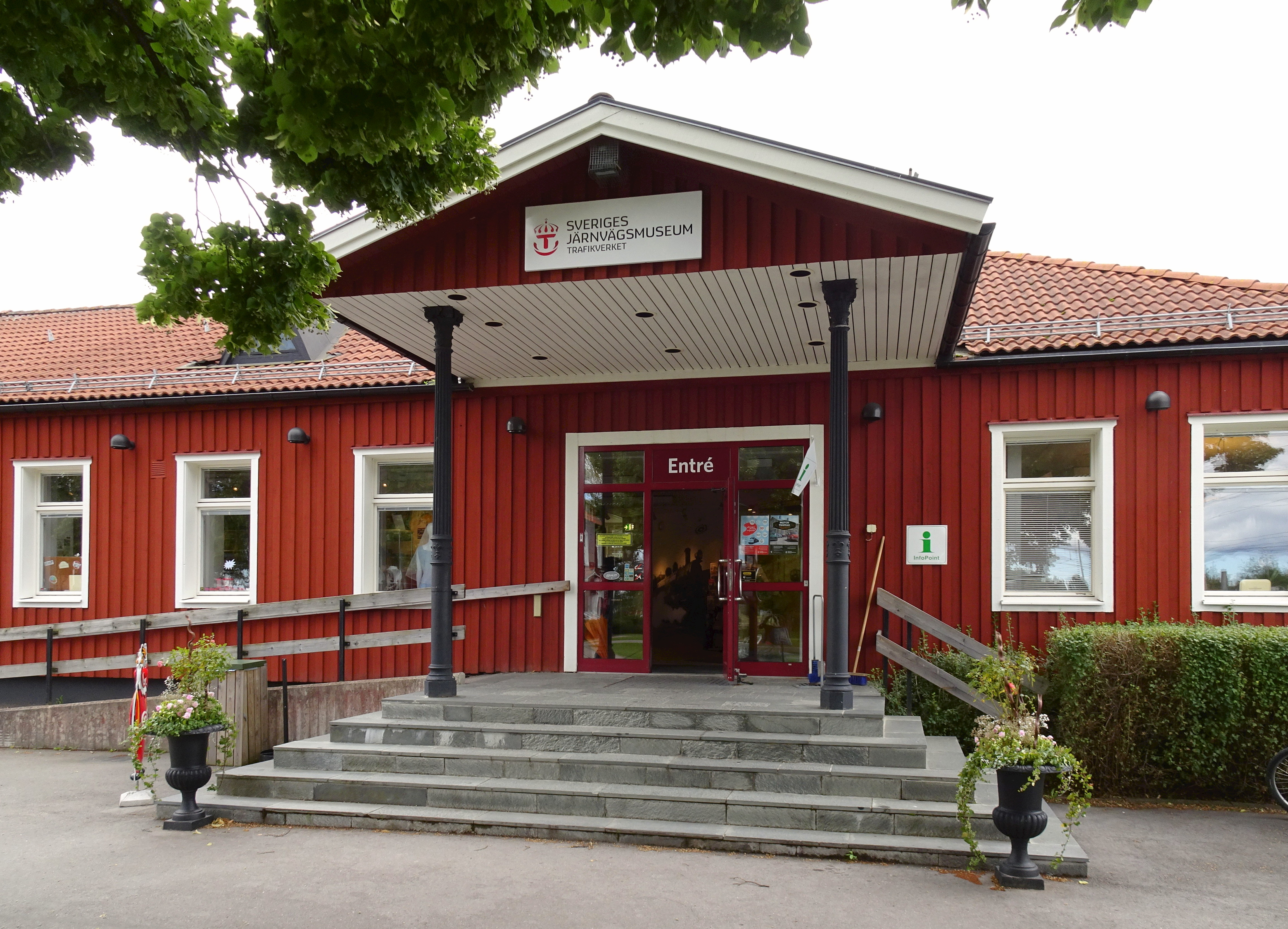 Sveriges Järnvägsmuseum Entré